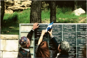 הלוח שהוקדש לאדוארדו פוקריני ביד ושם, ירושלים, 1995